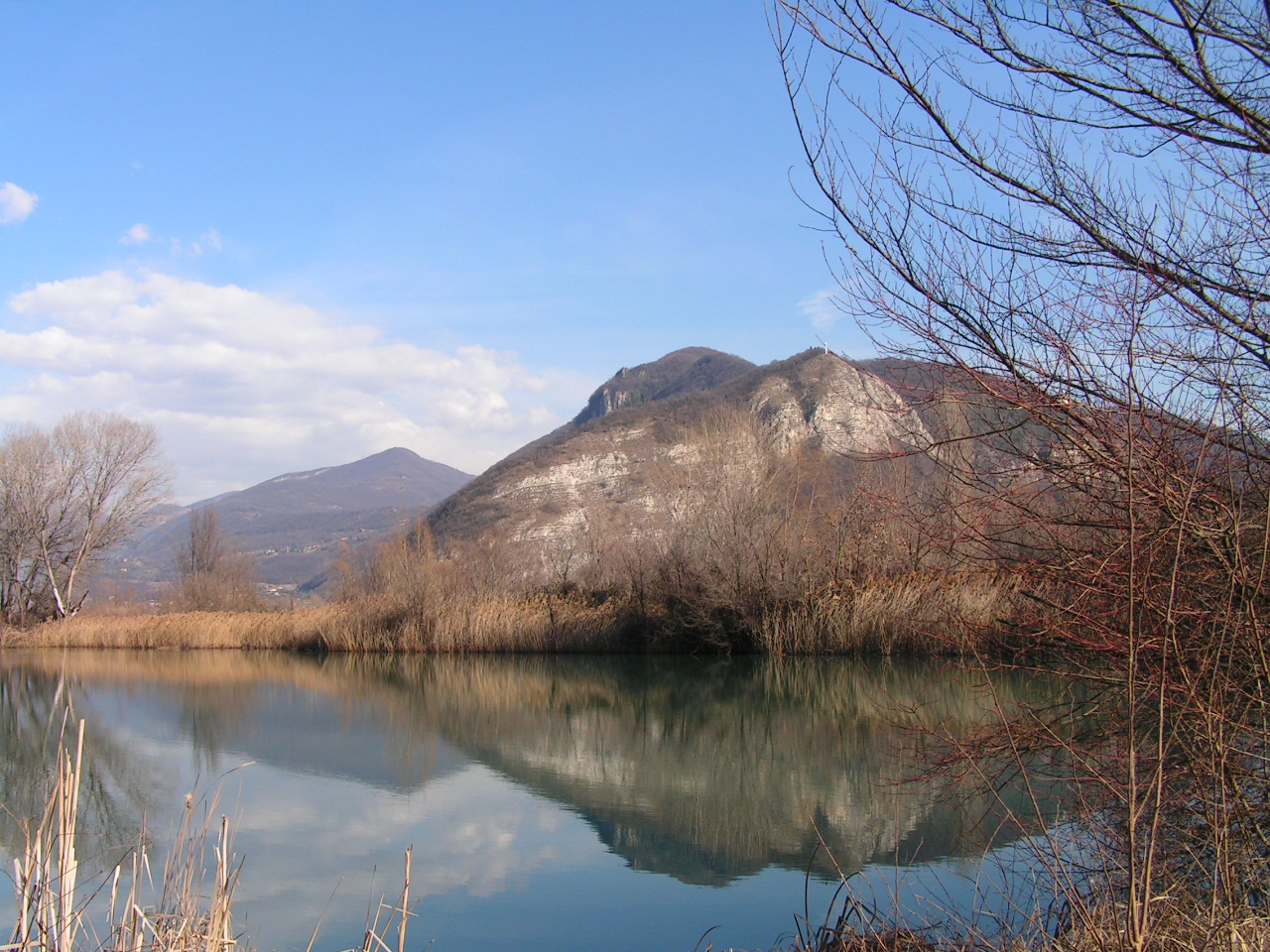 Vista del Monte di Provaglio d'Iseo riflesso nell'acqua della Riserva Naturale delle Torbiere del Sebino.